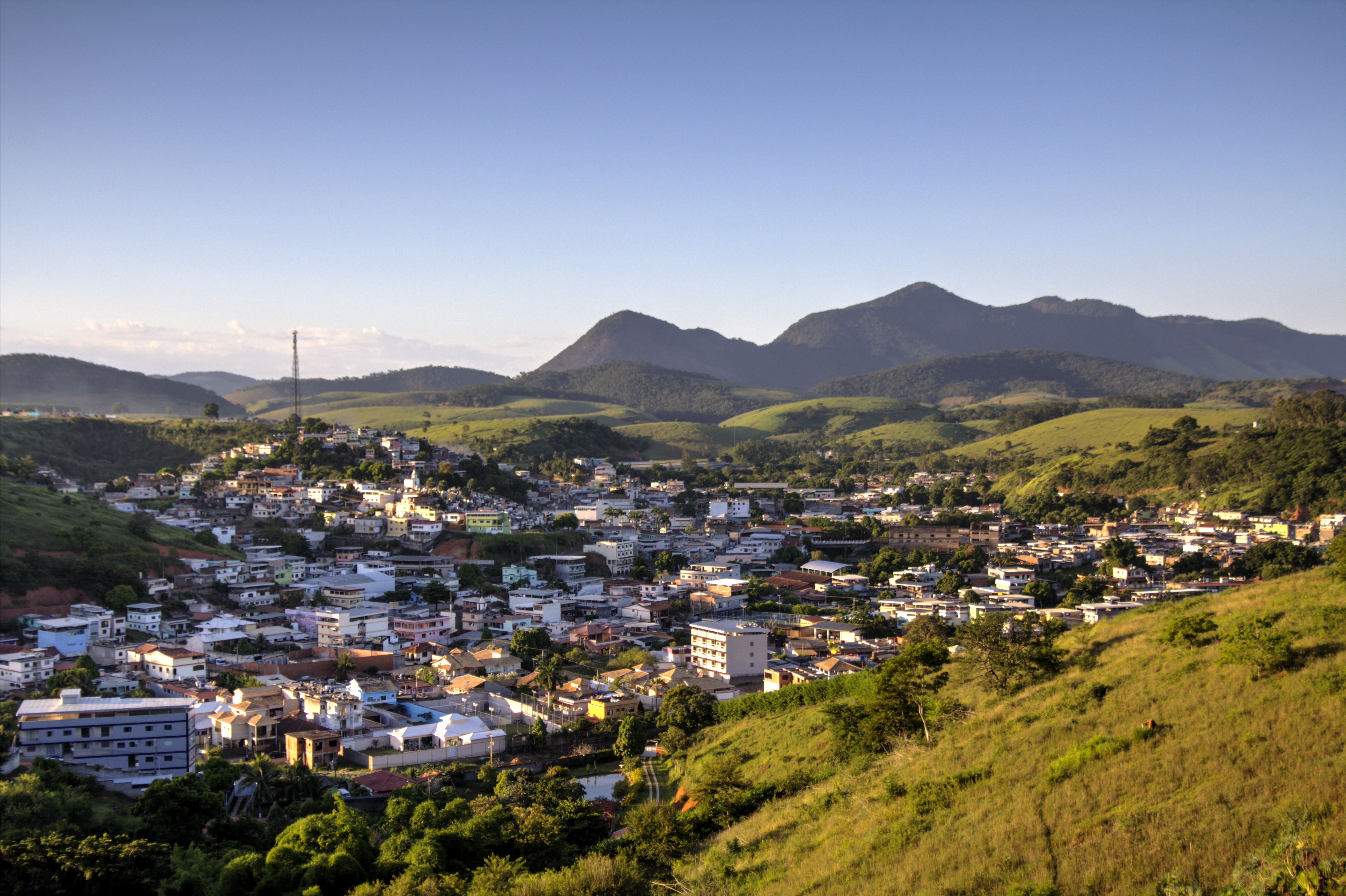 Vista do bairro São Pedro (Três mil)